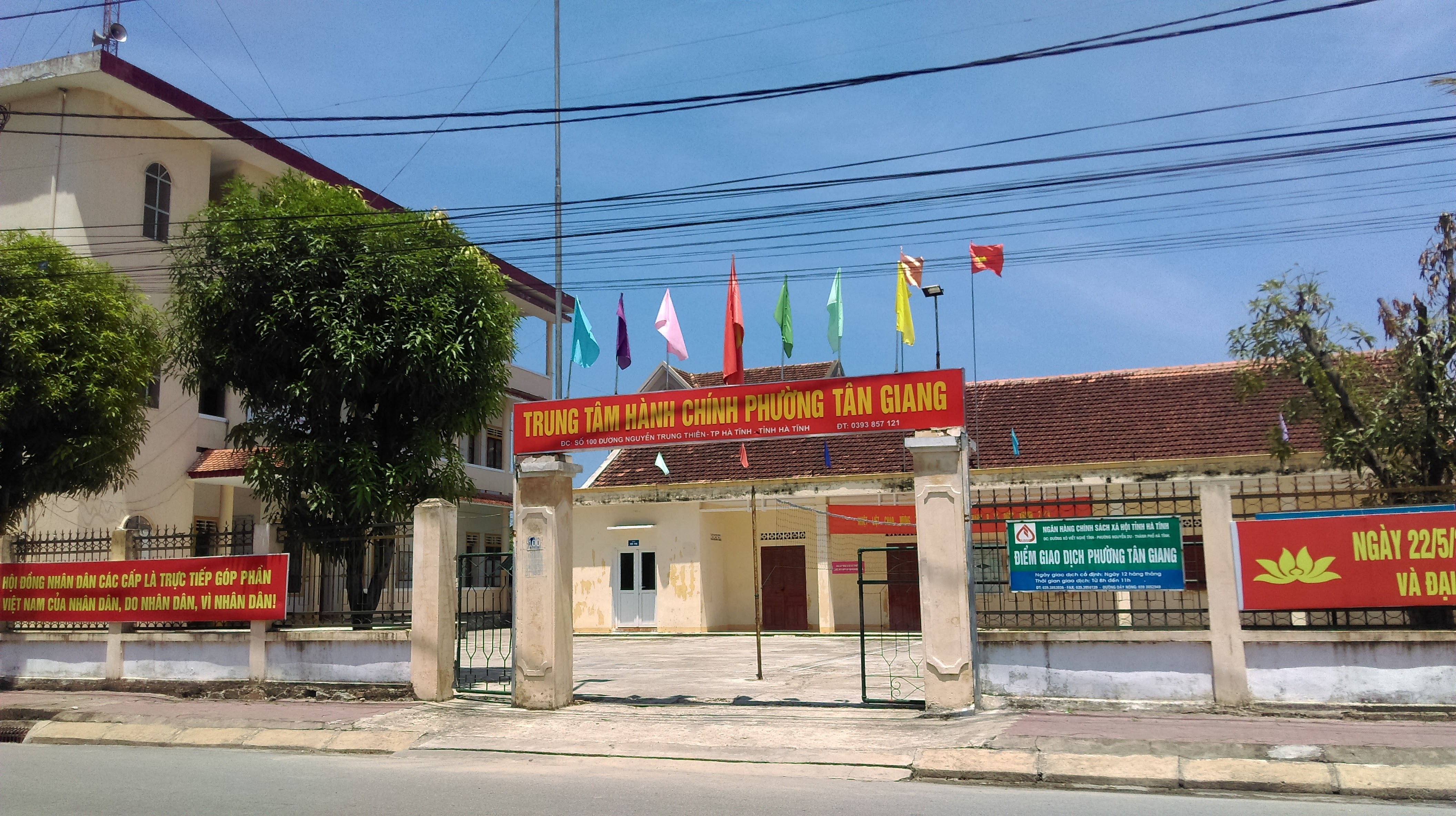 Trung tâm Hành chính phường Tân Giang, Hà Tĩnh